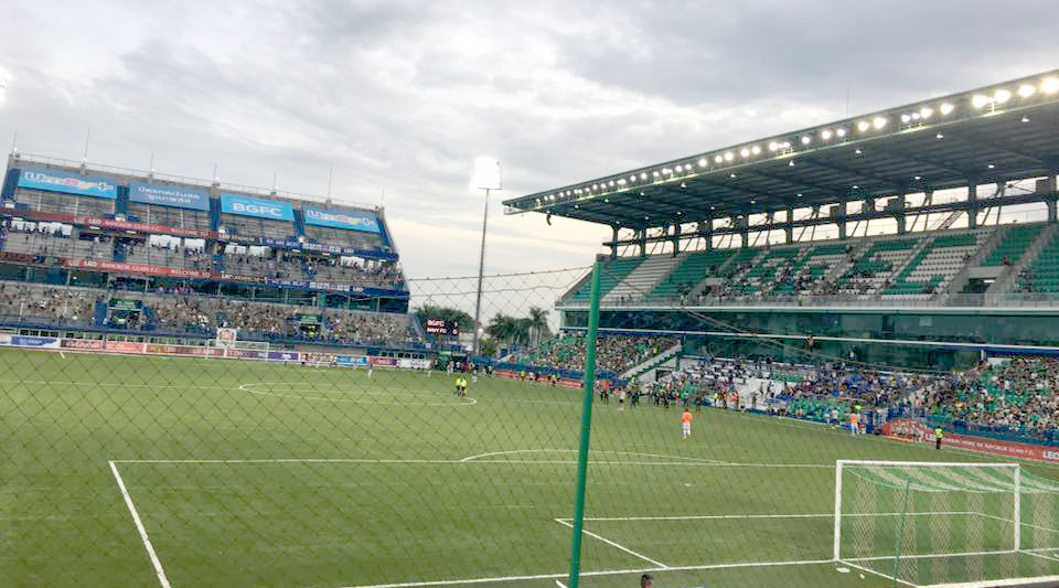 Leo Stadion